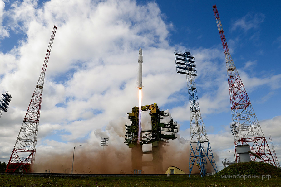 Первый испытательный пуск ракеты-носителя «Ангара-1.2ПП» (ГИК Плесецк, Архангельская обл.)